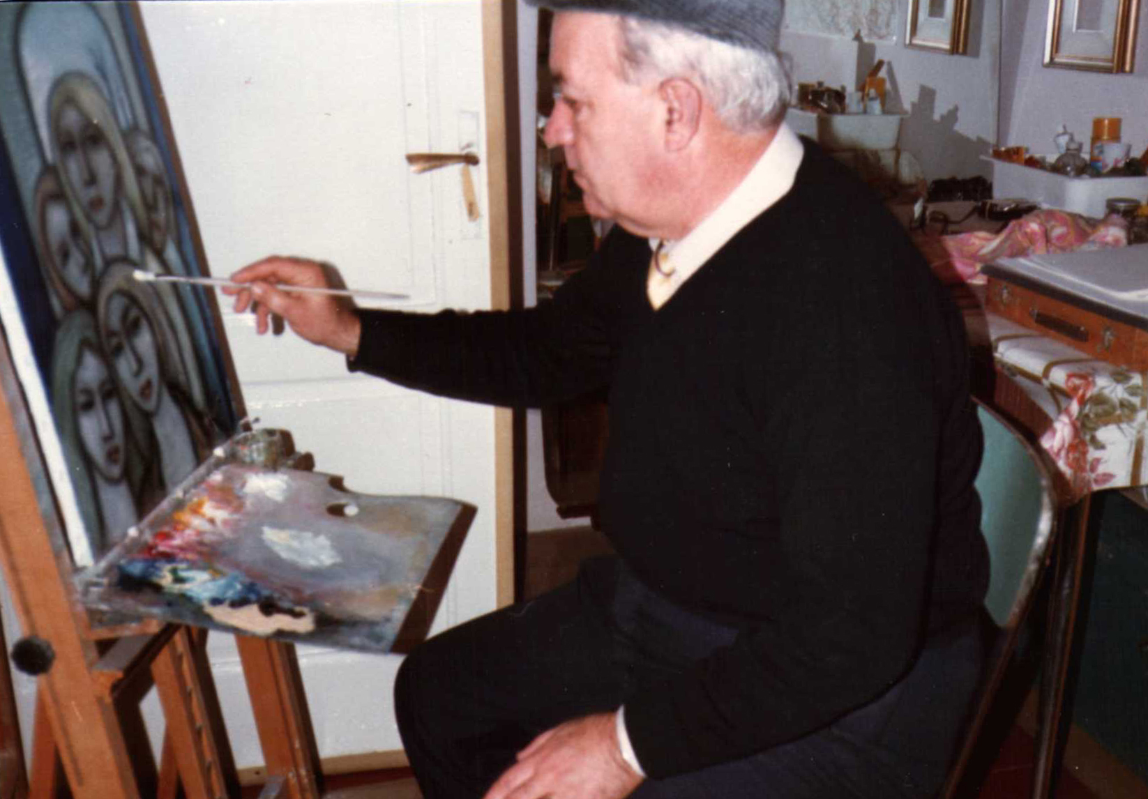 Decrive Angelo Caputo - pittore italiano - nato e morto a Foggia, 4-8-1927; 9-11-2001 - mentre dipinge nel suo studio presso la casa in contrada Rignano Scalo - Comune di Foggia